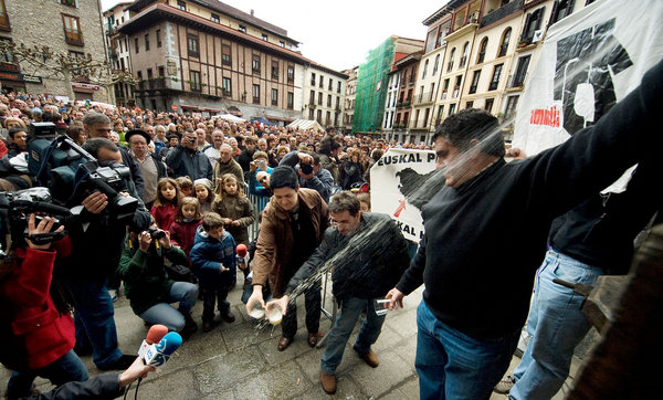 Sagardo Eguneko irudia.